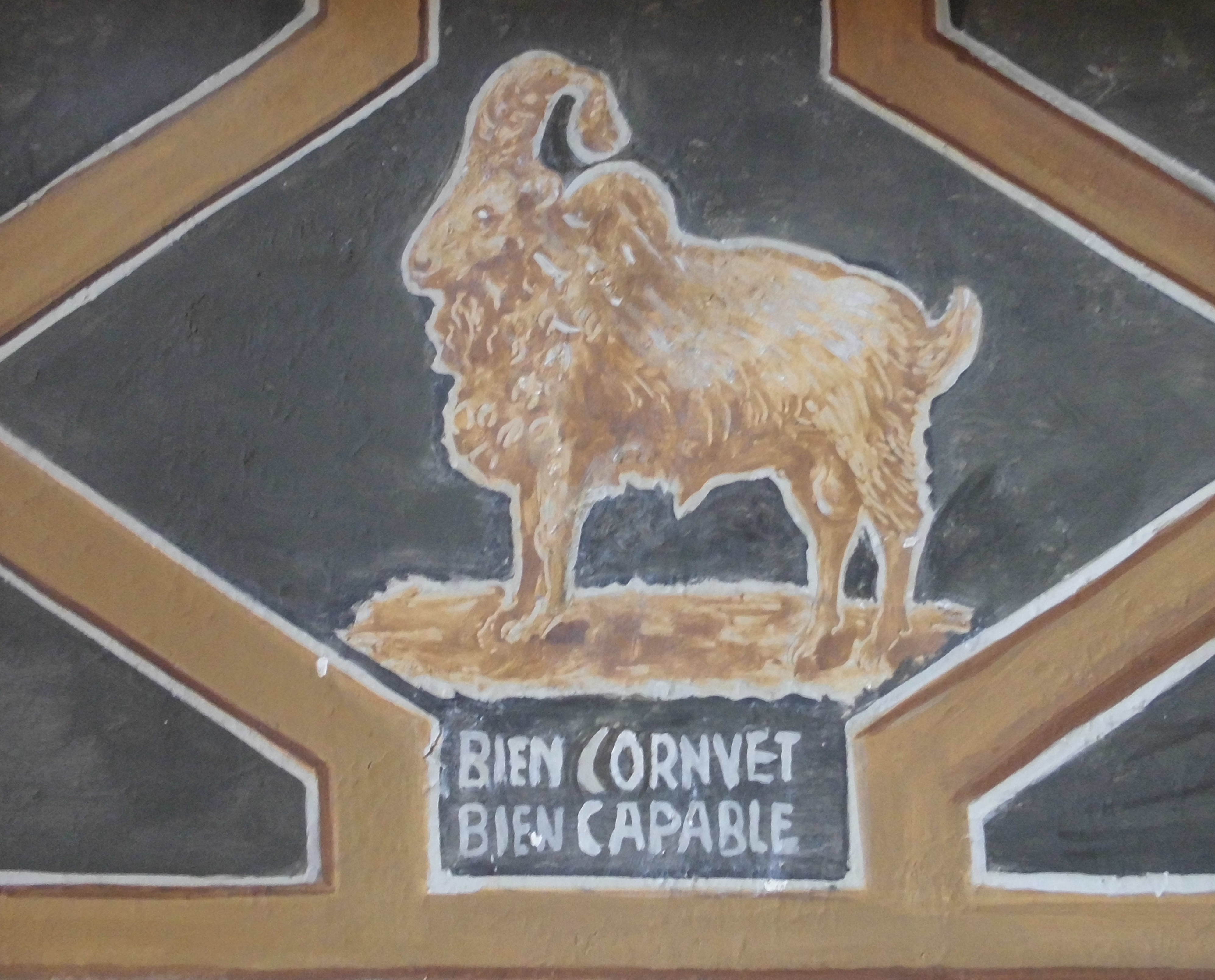 Der Geißbock an der Wand des Ratssaals im historischen Rathaus in Deidesheim erinnert an die Geißbockversteigerung. Der Geißbock muss nach altem Vertrag gut gehörnt (bien cornuet) und wohl gebeutelt (bien capable) sein